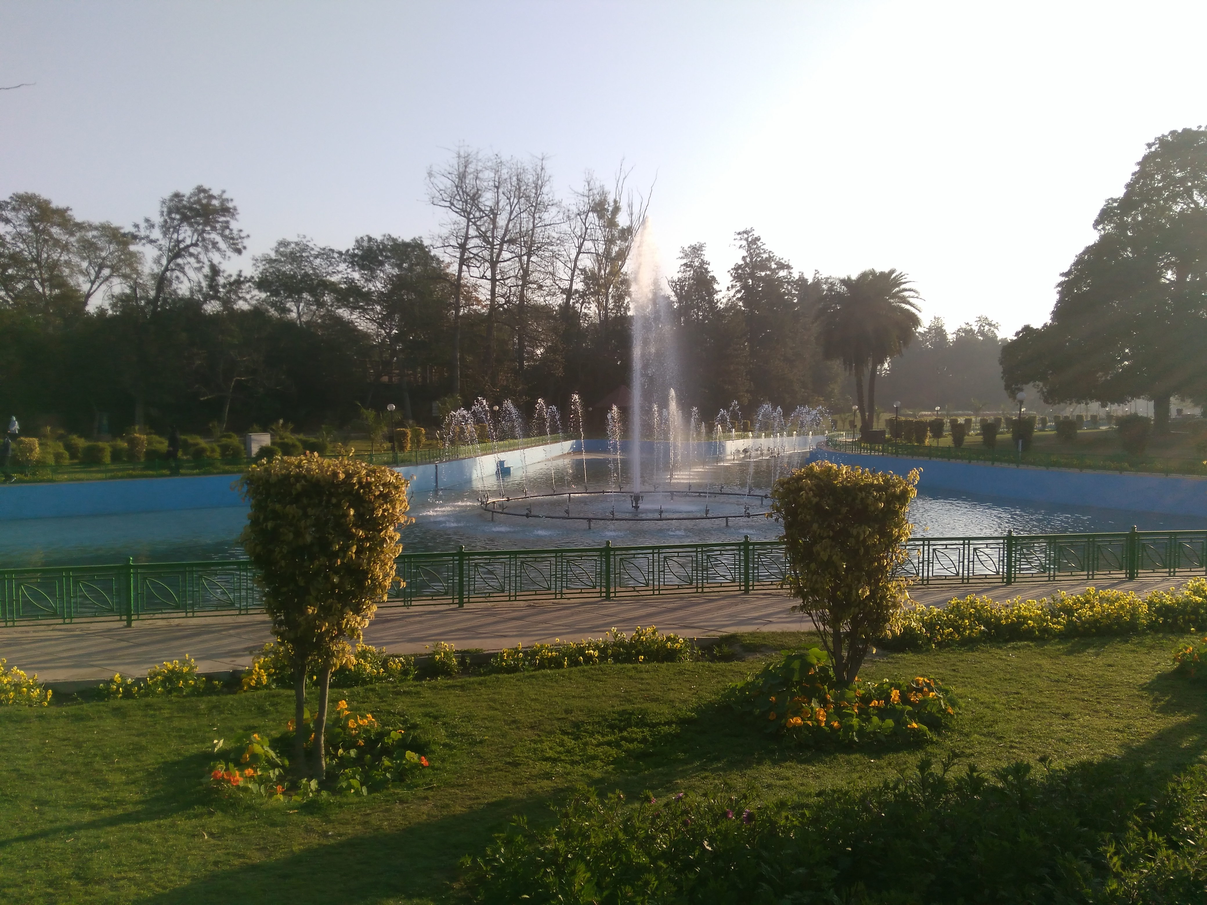 Jheel park Sarojini Nagar, Delhi, fountains